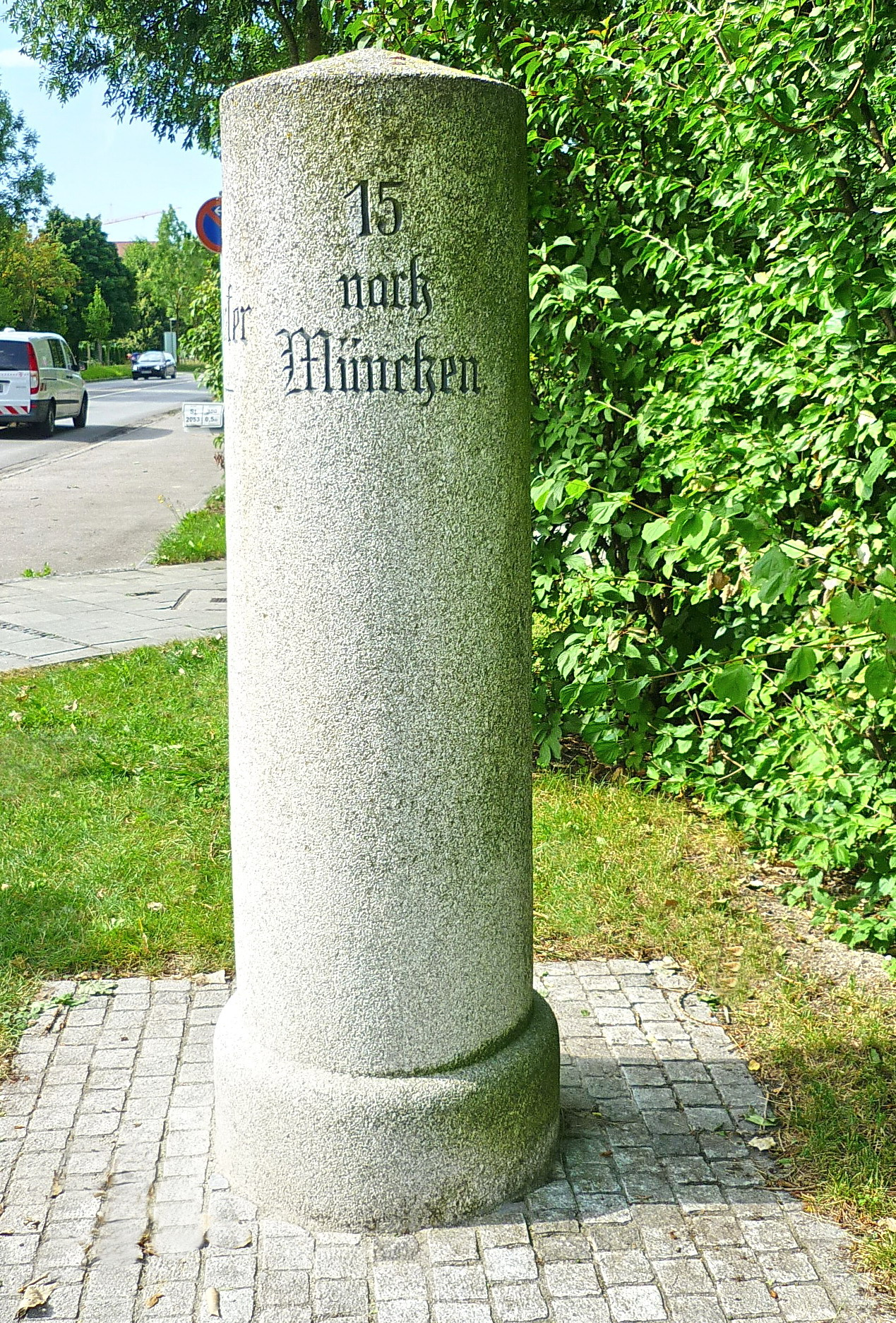 Ismaning, alter Kilometerstein, Ecke Freisingerstrasse - Am Griesacker